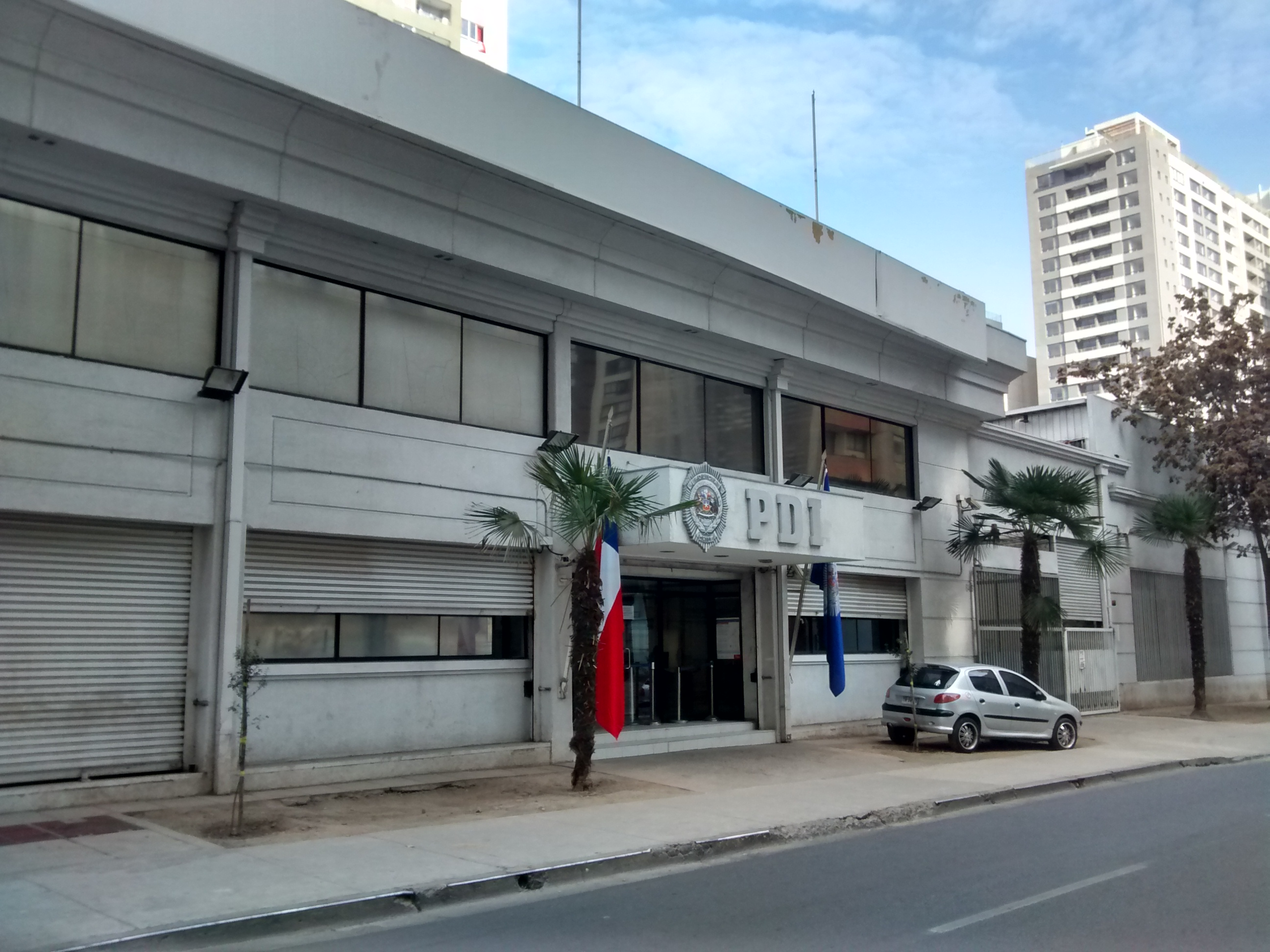 Jefatura Nacional de Extranjería y Policía Internacional de la Policía de Investigaciones de Chile, en Santiago de Chile.